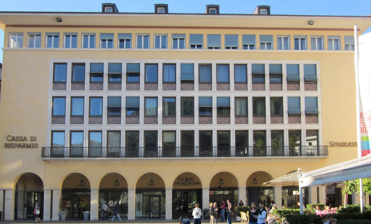 Agenzia 1 della cassa di risparmio di Bolzano nella Piazza Walther